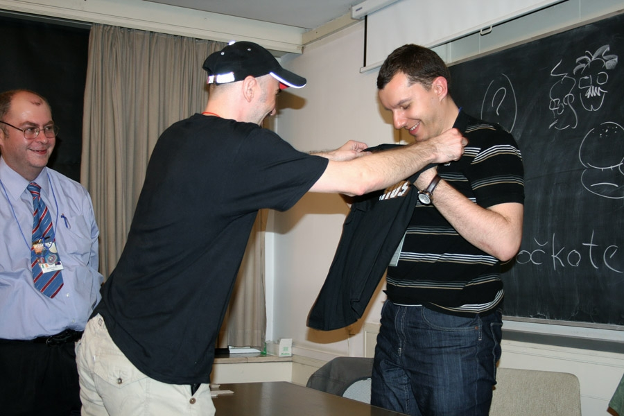 Konvencija Kontakt, koja je spojila 34. SFeraKon i 34. Eurocon u Zagrebu